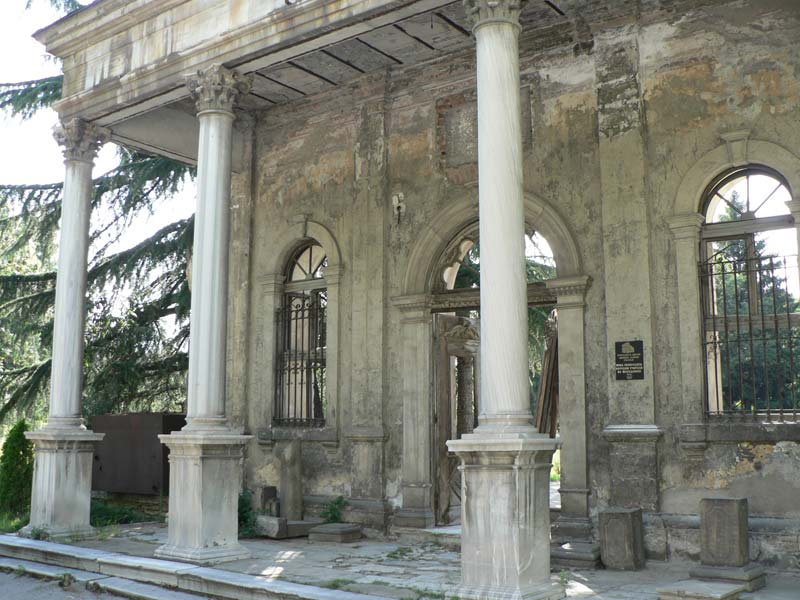 Наслов: Остатоци од Учителската школа во Скопје Аутор: Владимир Петков Дата: 10-2006